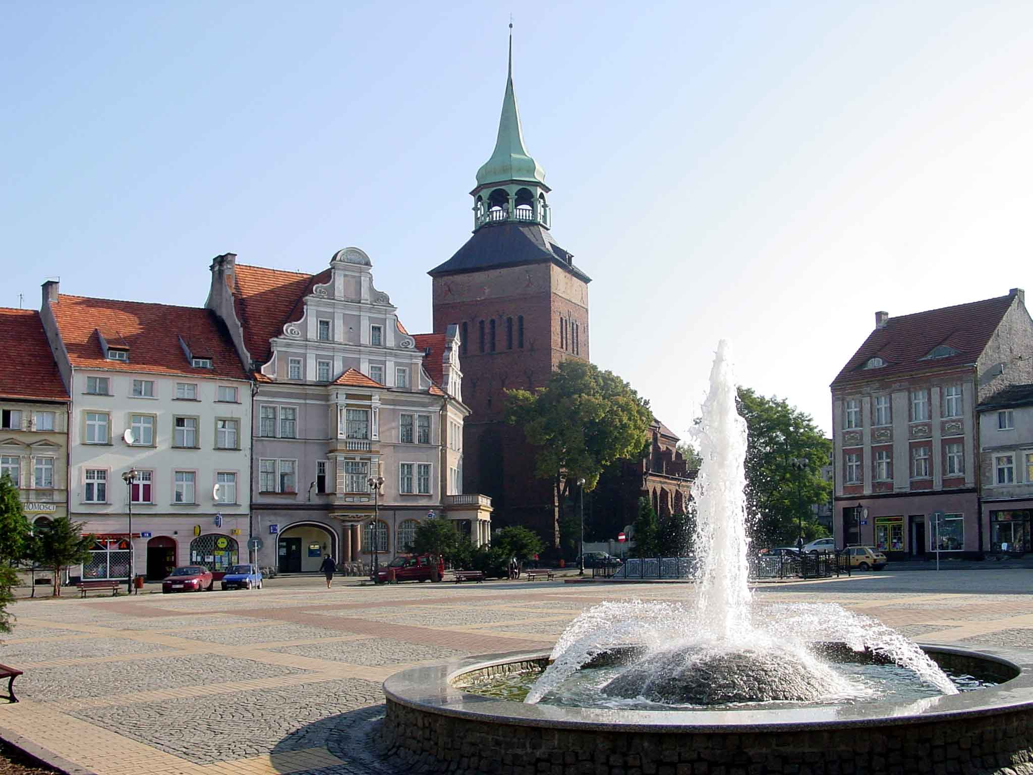 Białogard, Plac Wolności.